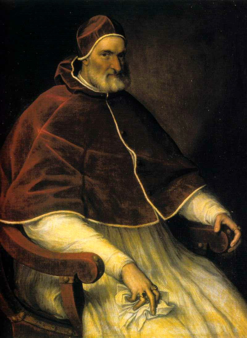 Ritratto di Pio IV